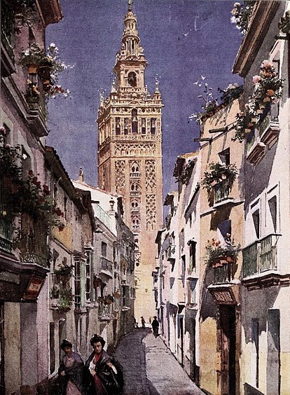 García y Rodríguez: Gasse in Sevilla mit Giralda (1196 erbautes Minarett, heute Glockenturm der Kathedrale). Kolorierte Fotografie. Aus: Blanco y Negro, Revista Illustrada, 17. Jahrgang, Madrid, 26. Januar 1907, Nr. 821, nicht paginiert.